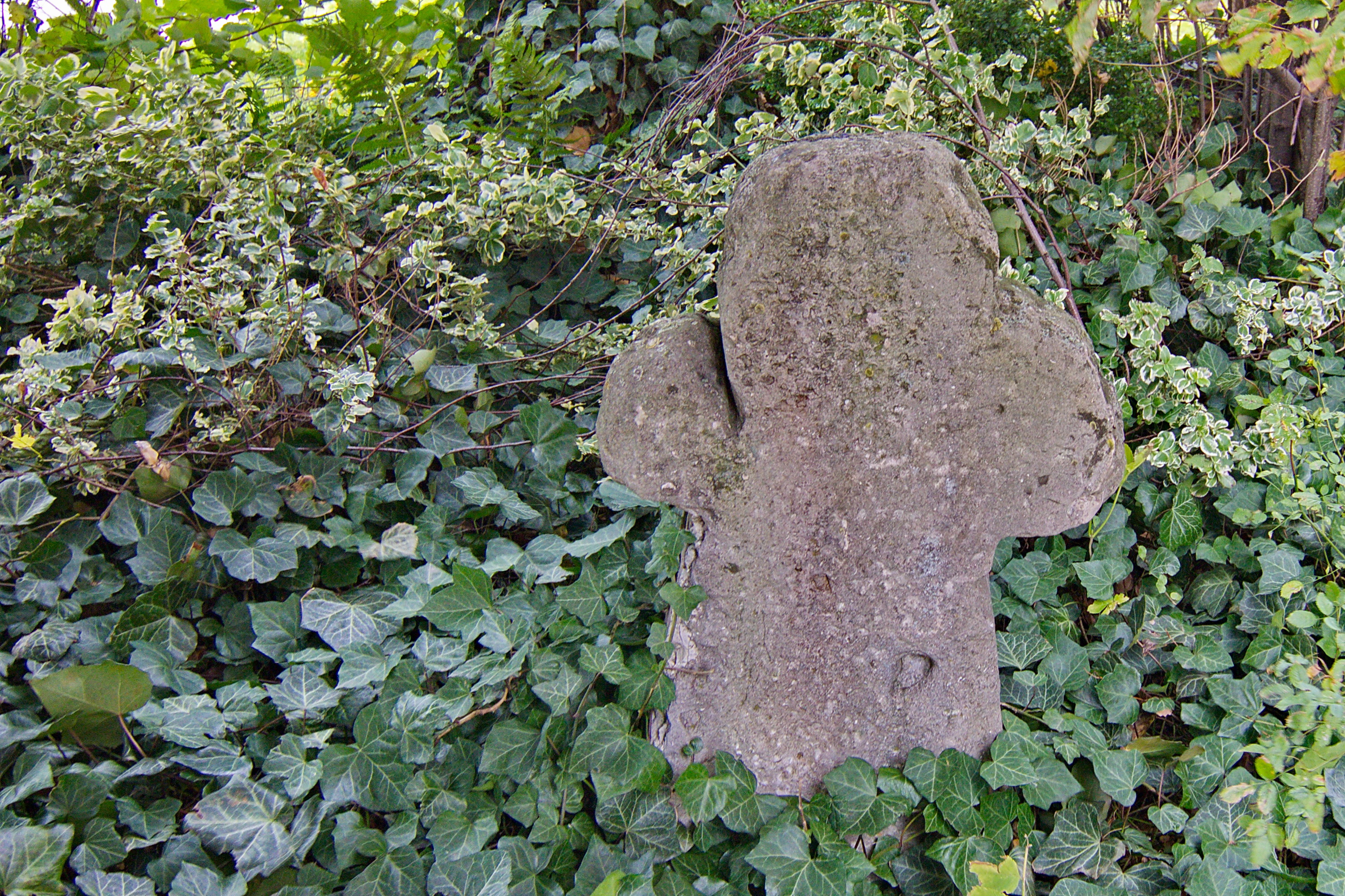 Vor dem Eingang der Kirche steht das älteste Denkmal von Fümmelse, ein Steinkreuz, vermutlich ein Sühnezeichen für eine begangene Bluttat.